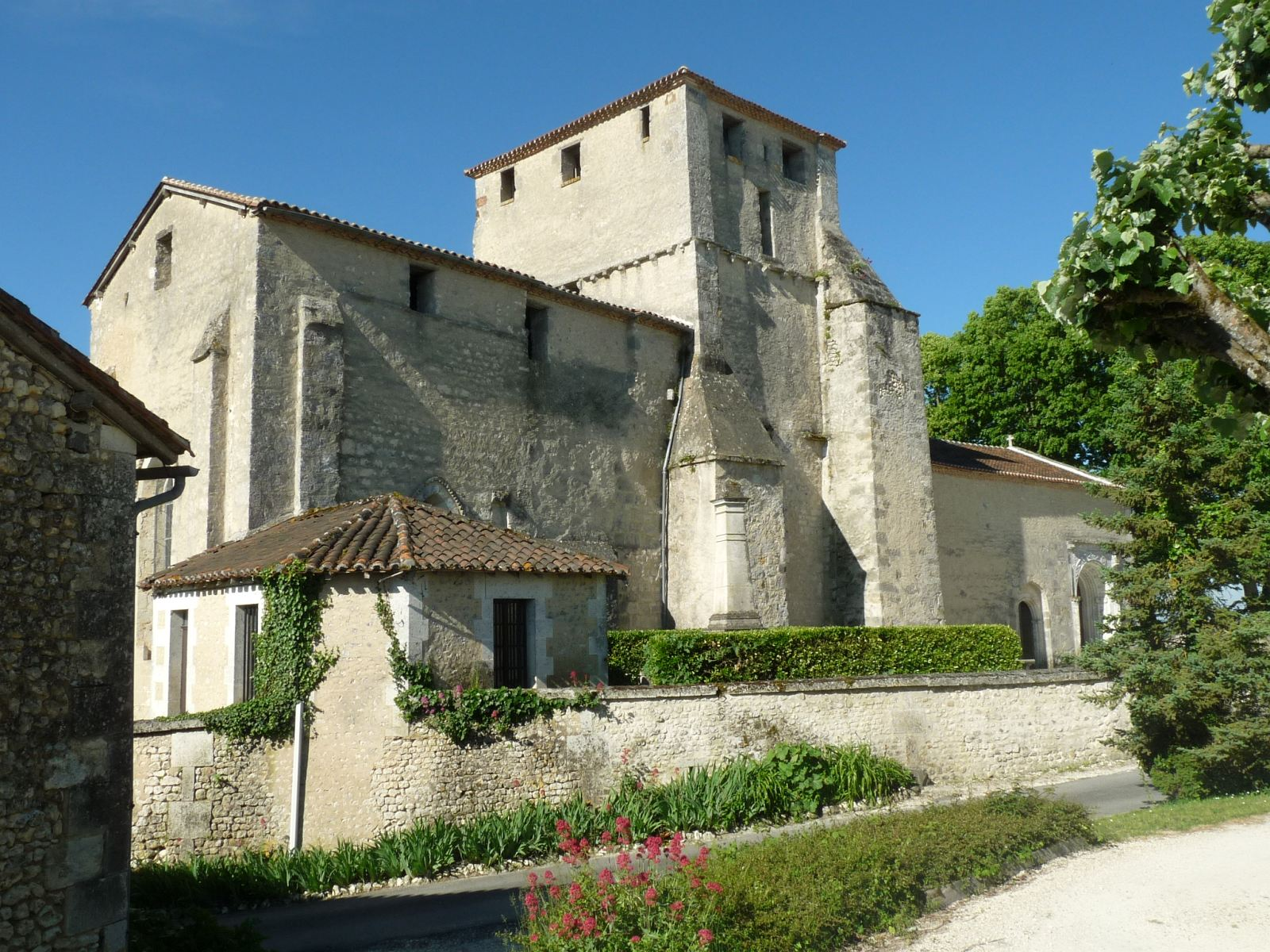 l'église de St-Amant, Charente, France